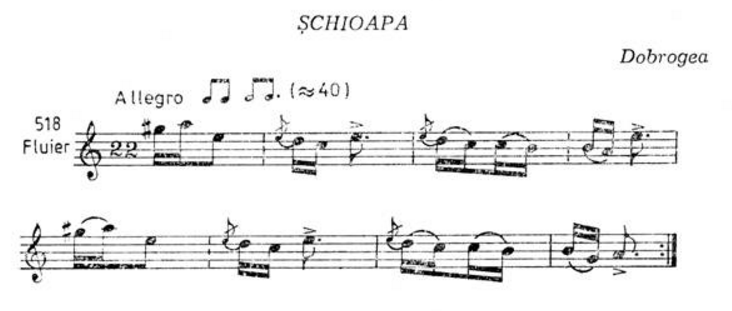 Dansul popular "Şchioapa" Sursa - Emilia Comişel, Folclor muzical, nr. 210 Bucureşti, 1967, p. 161